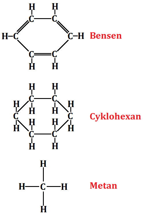 Tre exempel på kolväten, bensen, cyklohexen och metan.